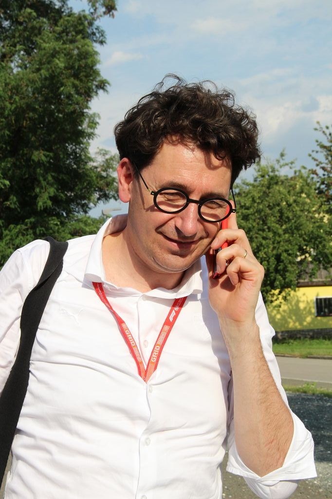 Formula 1 2019 / Schloss Gabelhofen